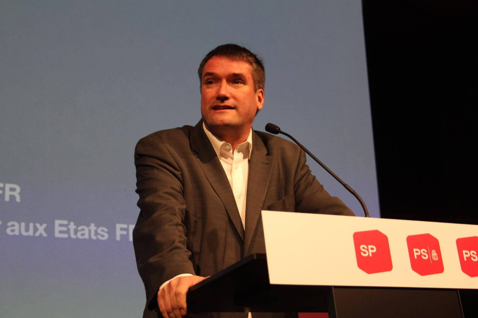 Christian Levrat, en décembre 2016, lors du Congrès de Thoune du PS Suisse.